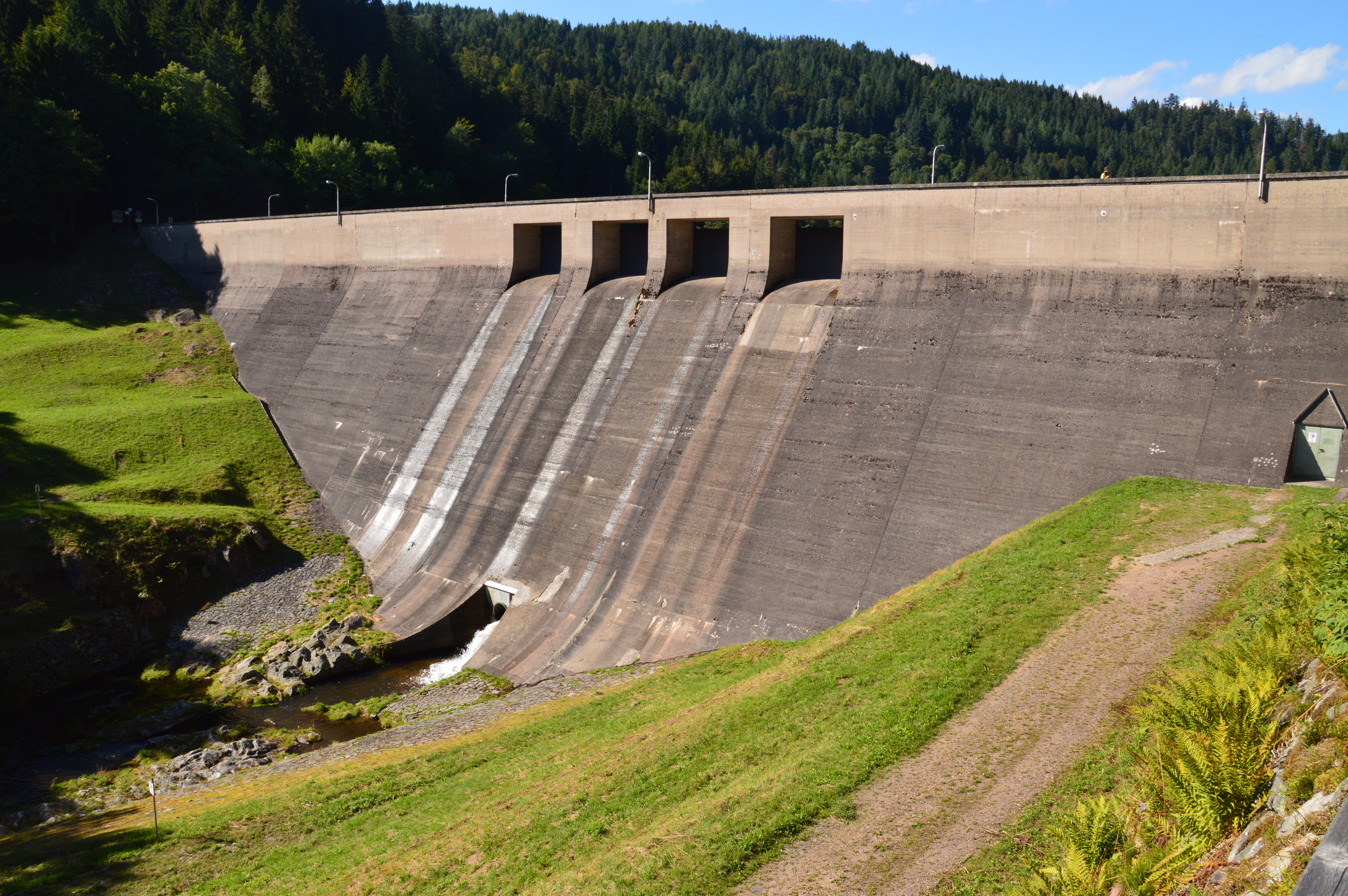 Staumuèr vom Albbeggi mit Grundablass vo dè Flusssitè hèr. Uffgnoo am 12. Auguscht 2013.